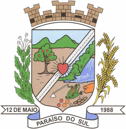 Brasão do município de Paraíso do Sul